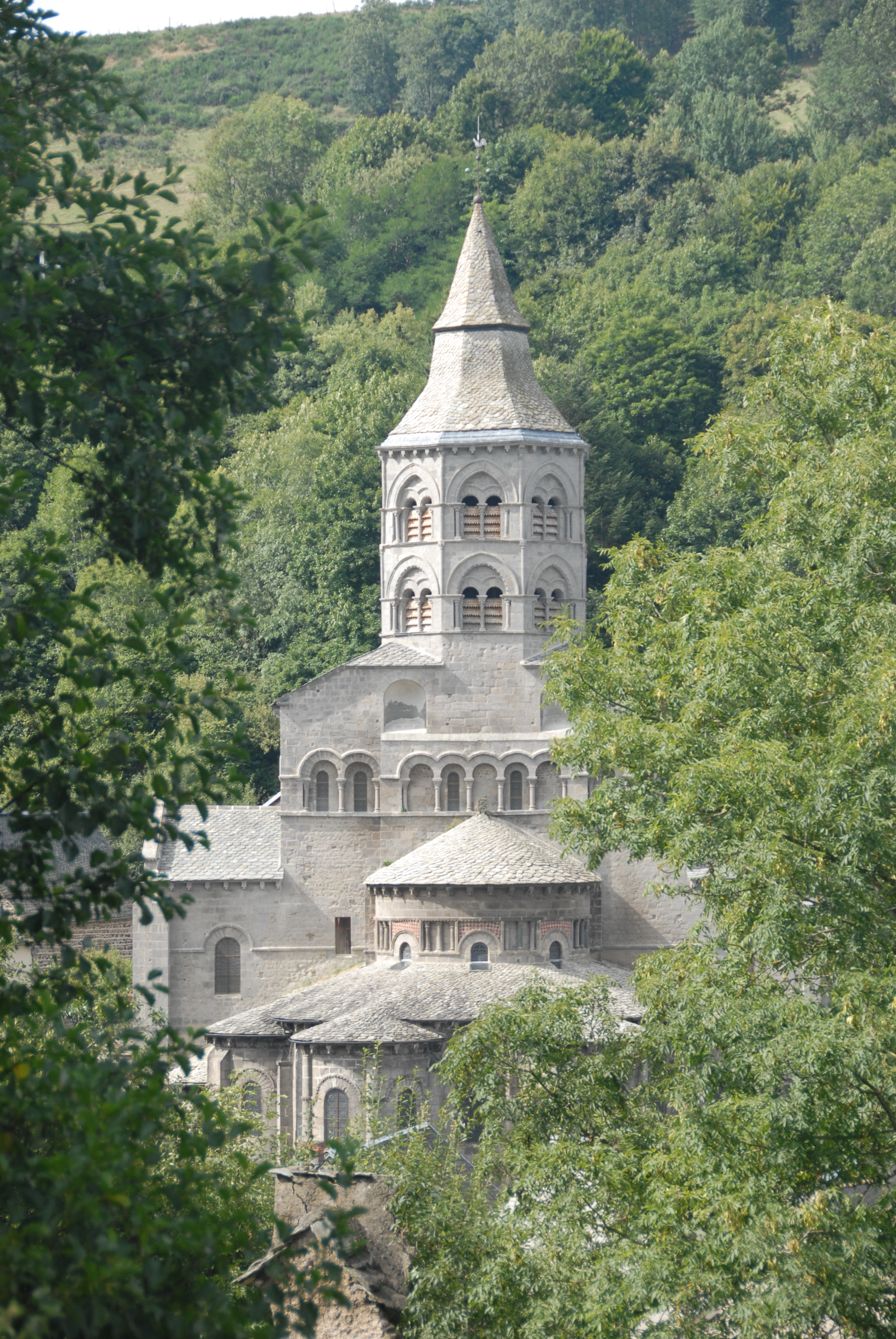 N.-D. d'Orcival